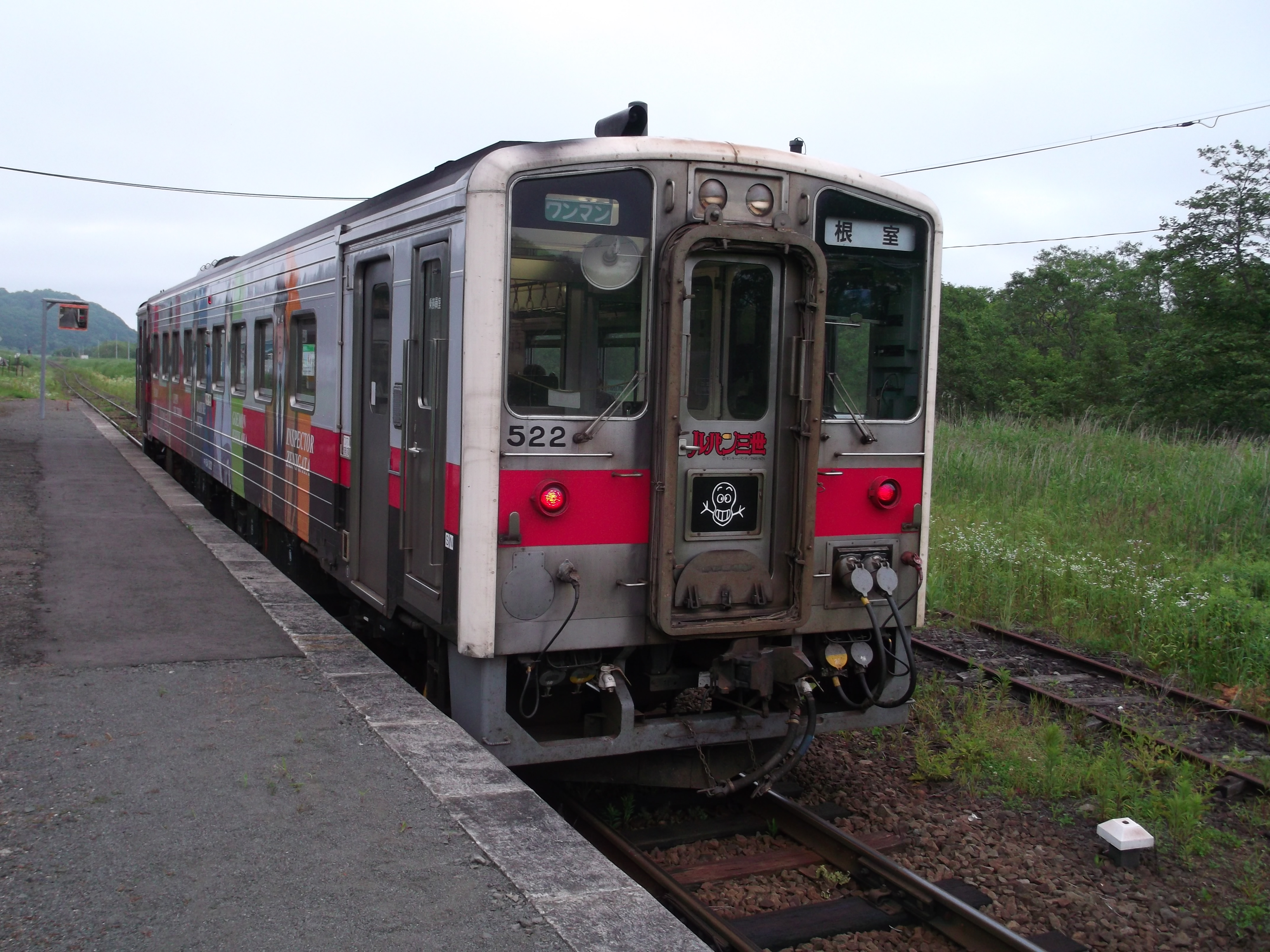 JR北海道キハ54形気動車（キハ54 522 ルパン3世ラッピング車）JR北海道根室本線、糸魚沢駅にて